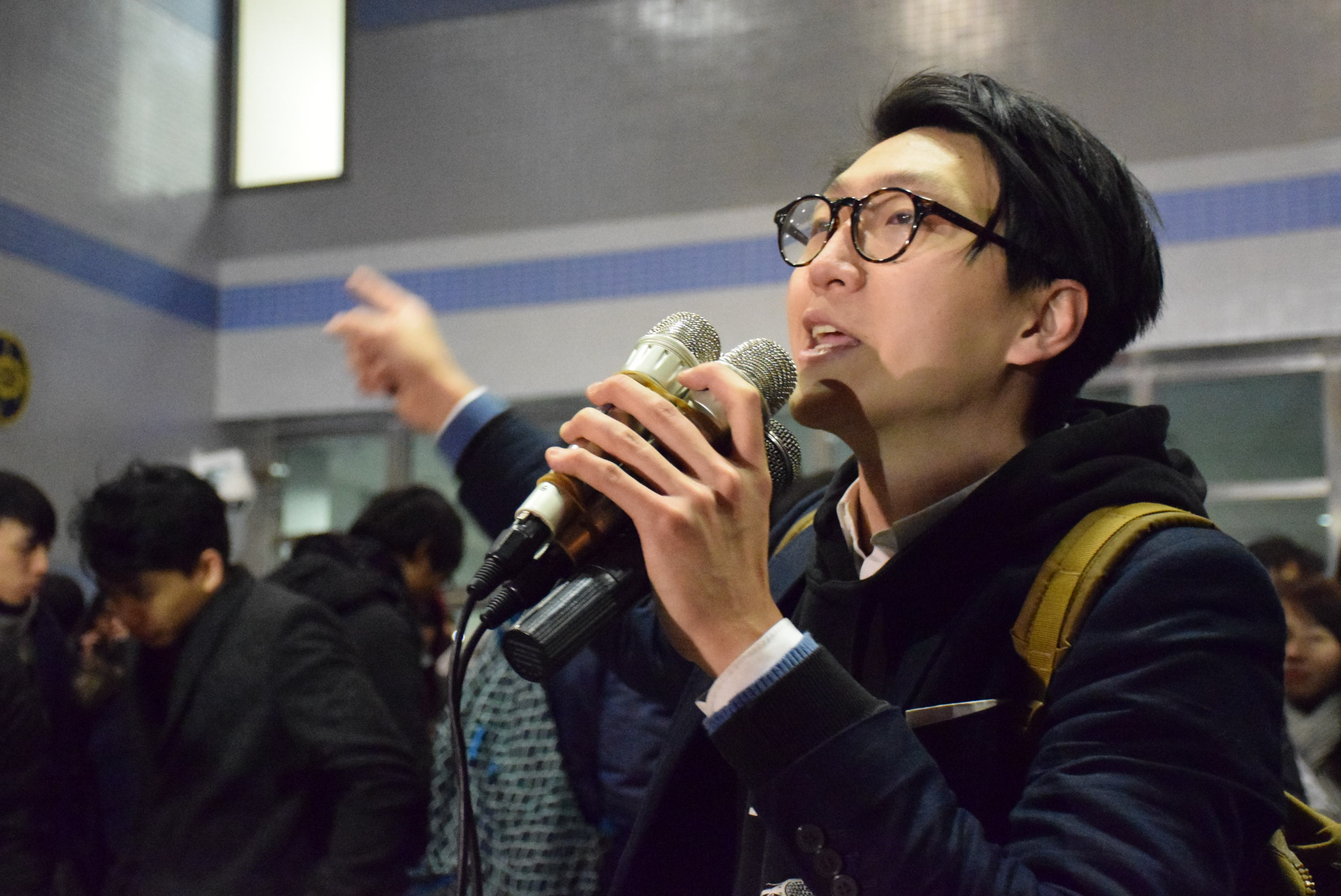 港大罷課委員會成員梁天琦。（美國之音湯惠芸攝）